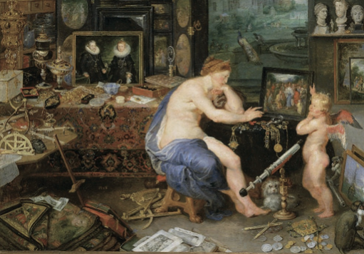 Fig. 7. Parte del quadro “Allegoria della Vista” di Jan Brueghel e Peter Paul Rubens, conservato al Museo Nazionale del Prado, Madrid. Oltre ai molti strumenti di geografia e astronomia, si nota il cannocchiale centrale, di aspetto molto moderno rispetto alla datazione del quadro (1617). Il cannocchiale sul pavimento, dietro il cherubino e tenuto dalla scimmietta, è molto simile a quello utilizzato dall’arciduca nel quadro più antico (ca. 1610).